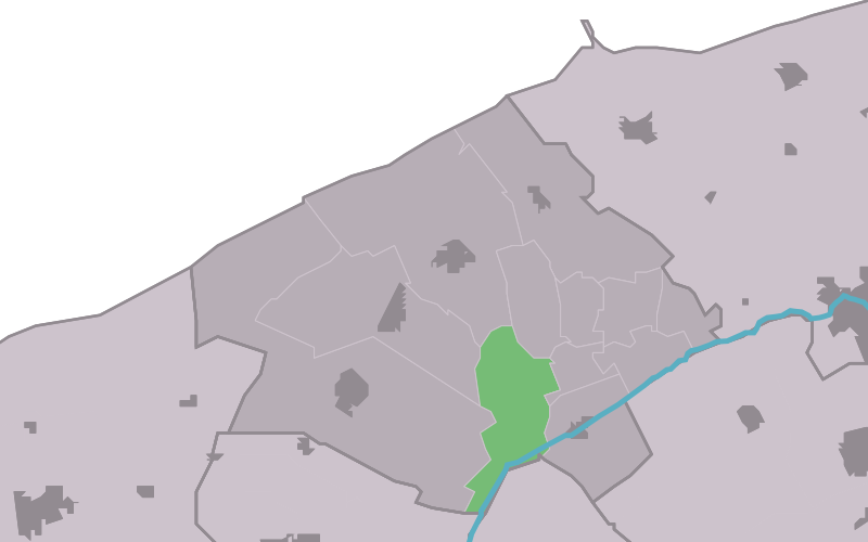 Kaartsje fan himrik fan Wânswert